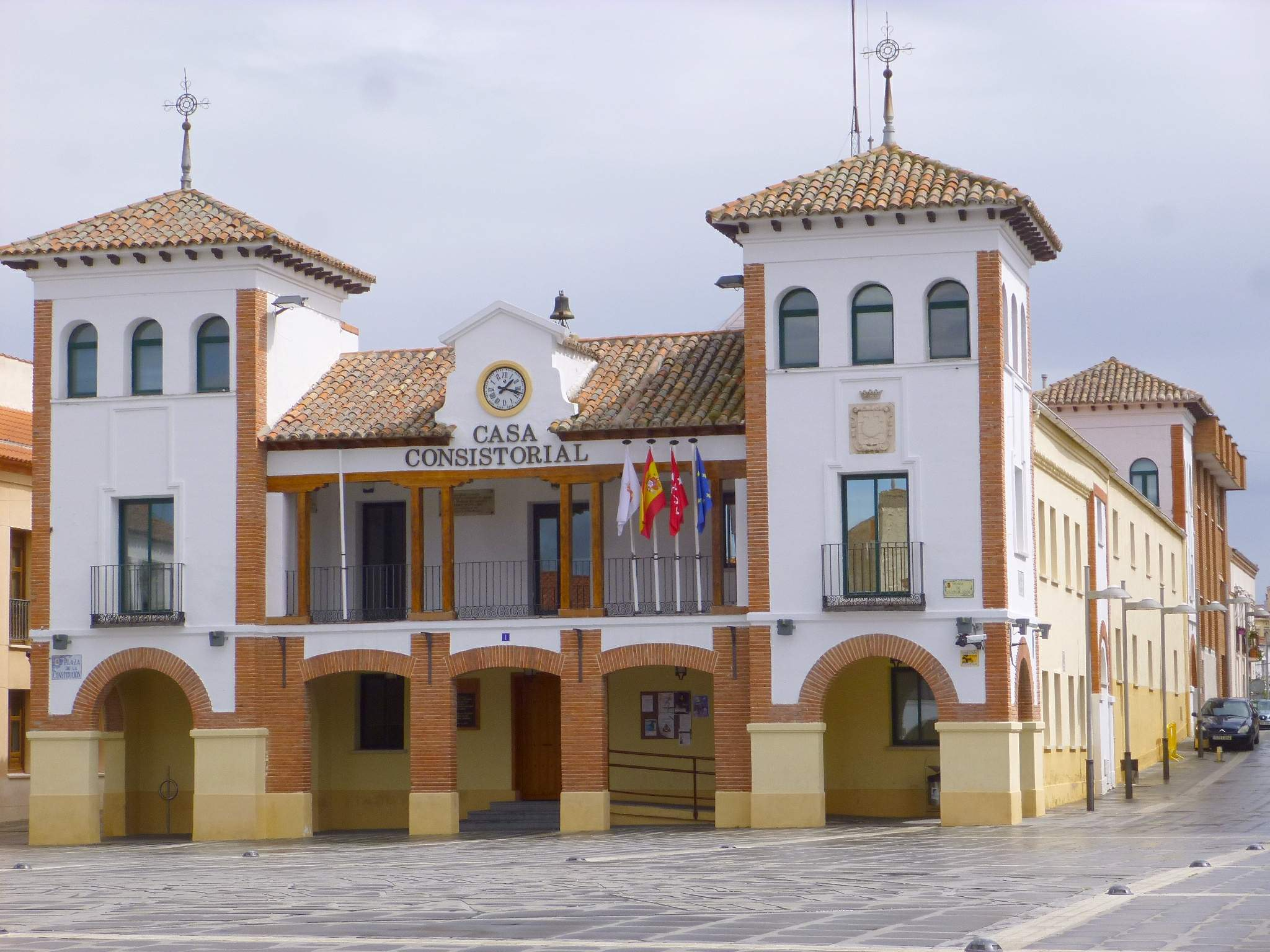 Pinto - Plaza de España y Ayuntamiento